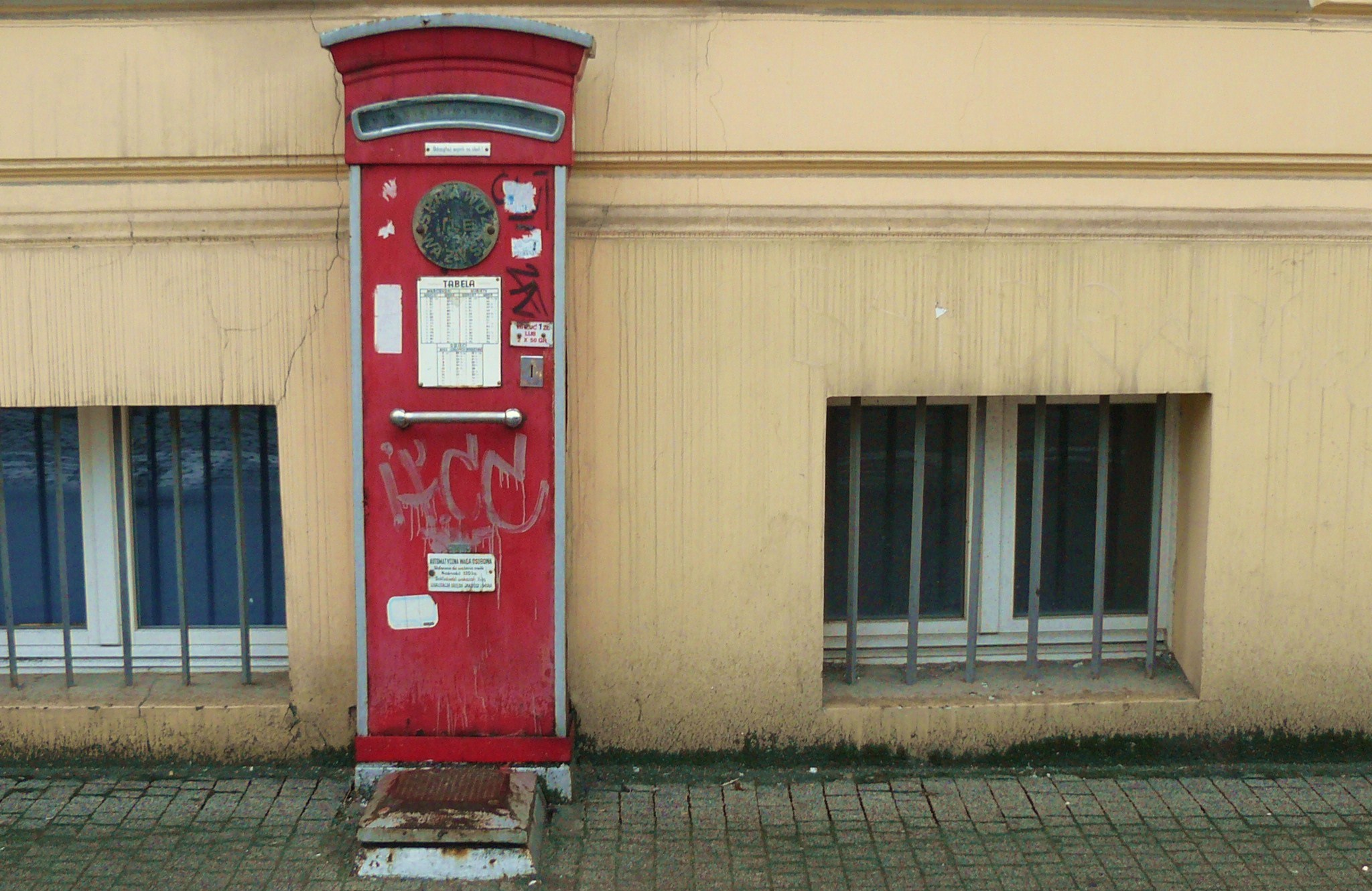 Waga publiczna w Poznaniu na al. Marcinkowskiego.